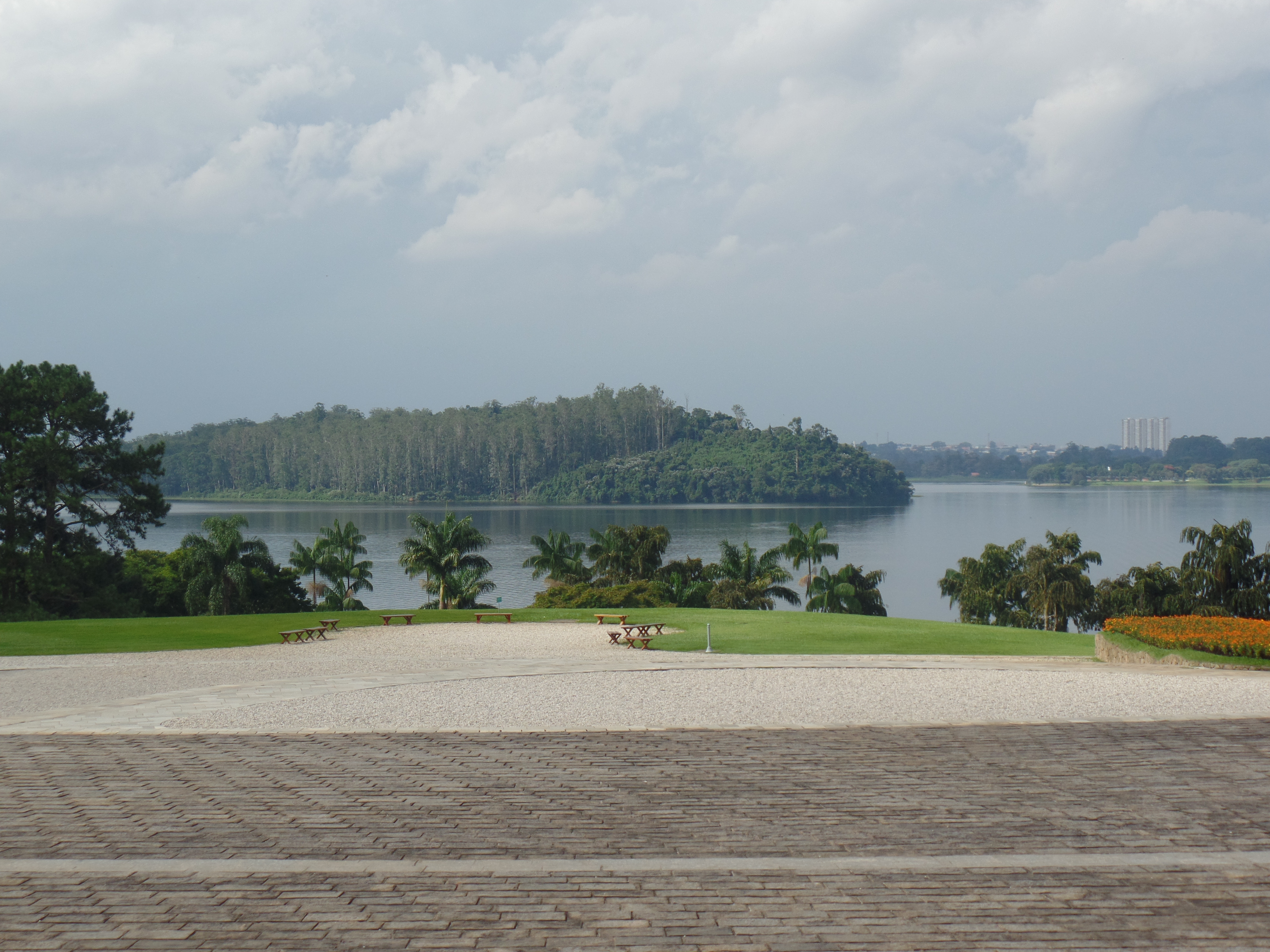 Balneario Dom Carlos, São Paulo - State of São Paulo, Brazil